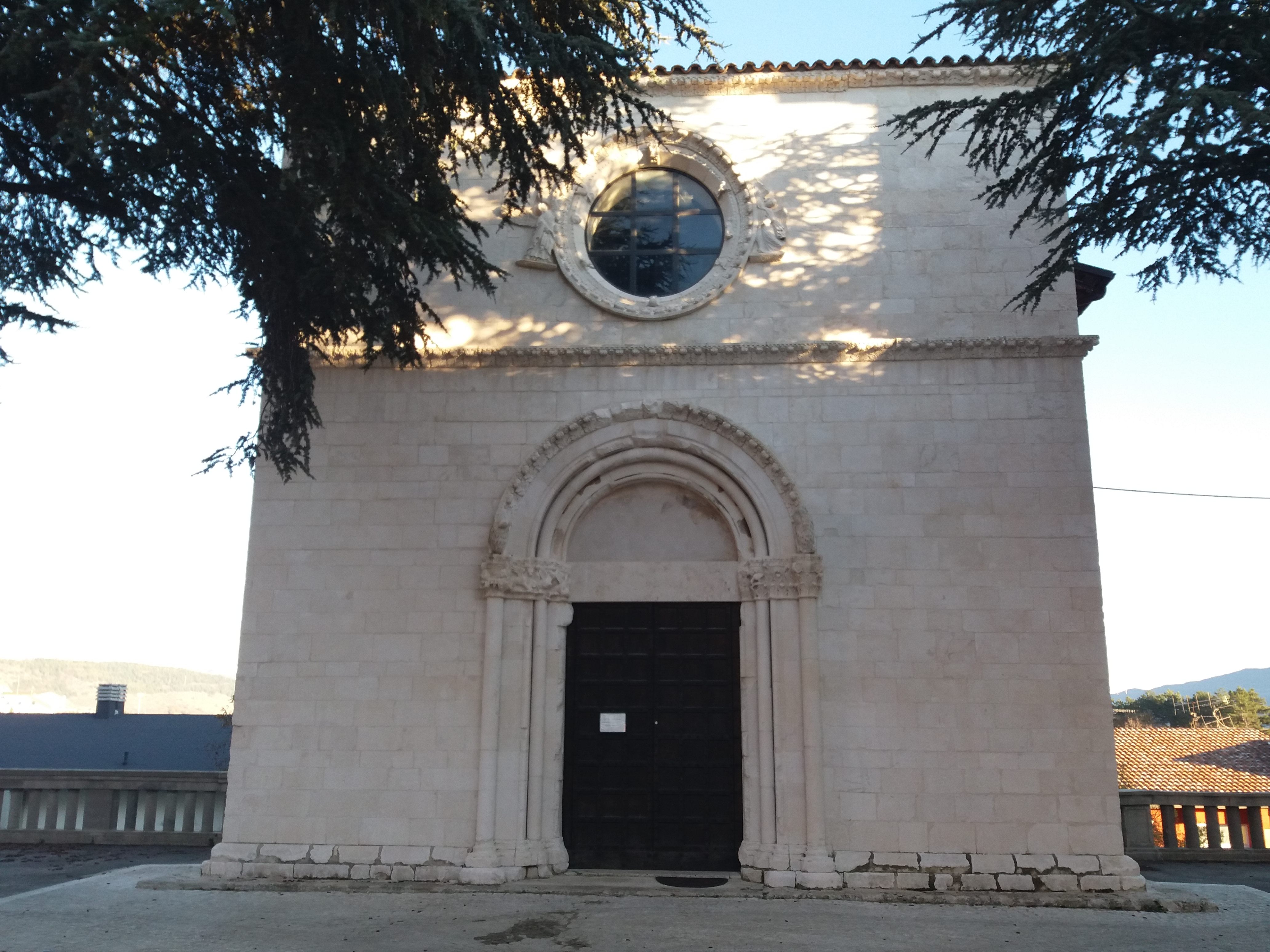 L'Aquila: Chiesa di Santa Maria di Forfona